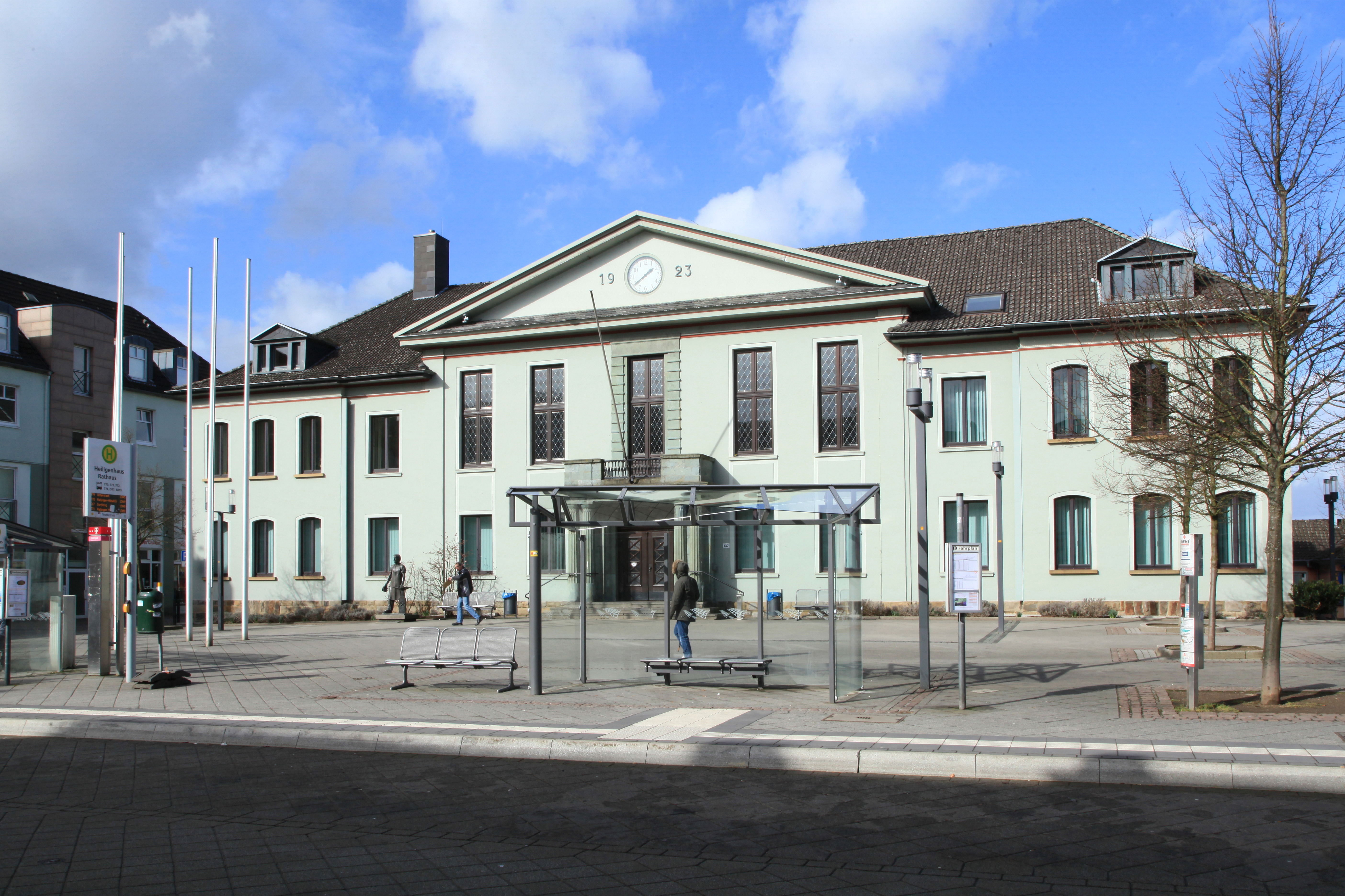 Hauptstraße, Rathausplatz und Rathaus in Heiligenhaus